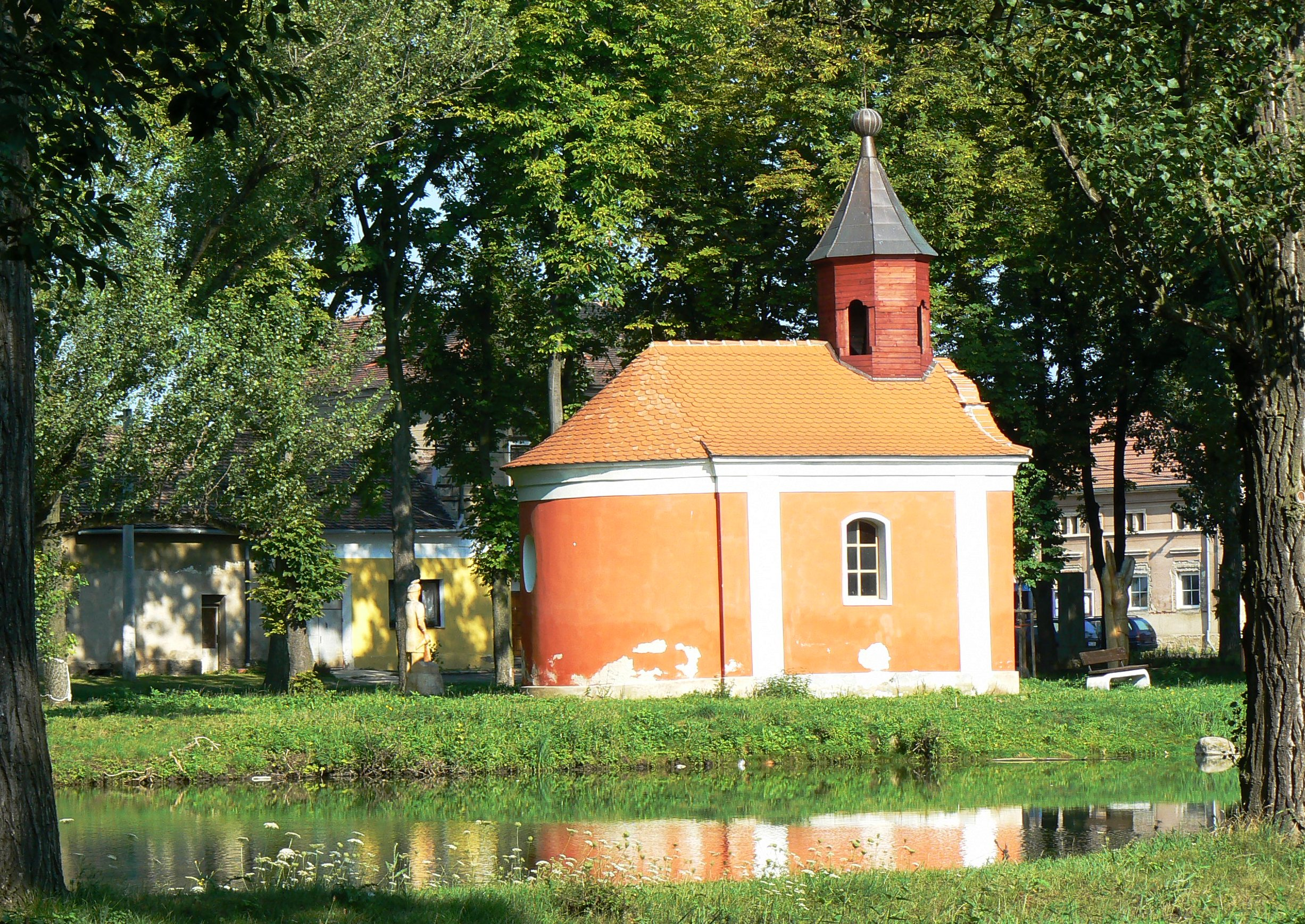 Kaple (Moravěves), náves, Moravěves